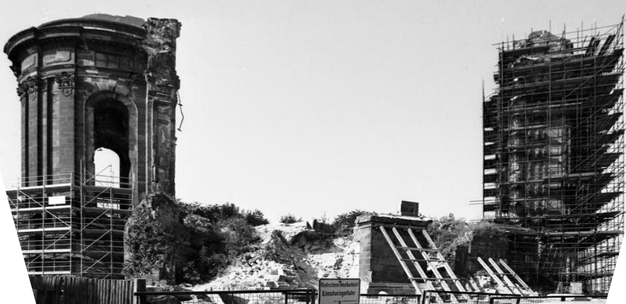 7.7.1991 Stadtansichten Dresden Ruine der Frauenkirche Information added by Wikimedia users.